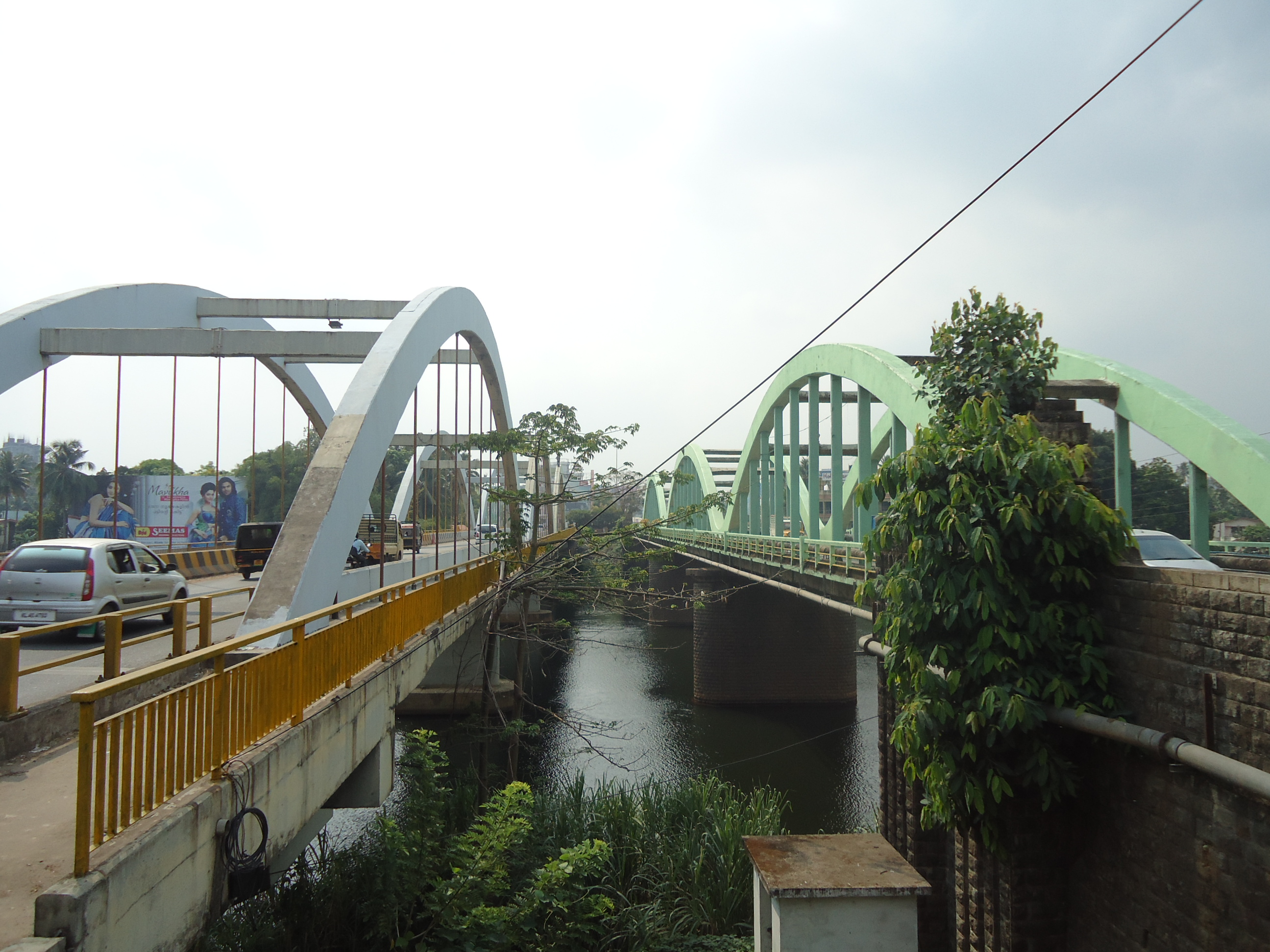 Marthandavarma bridge Aluva 1